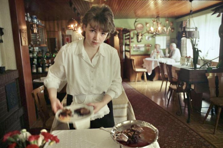 Juni 1988 Friedland: Ein gutbürgerliches Restaurant.